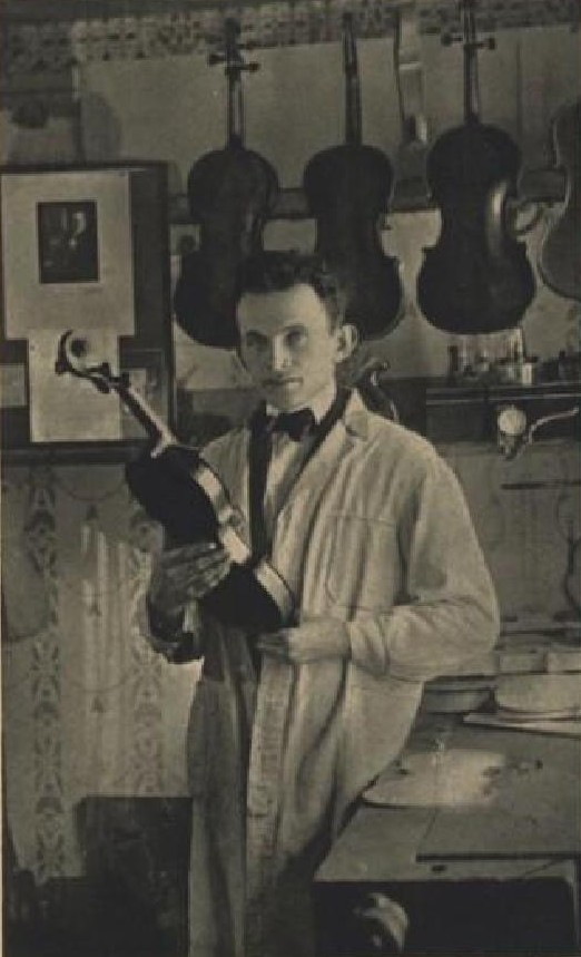 František Xaver Drozen (1898-1972), český houslař